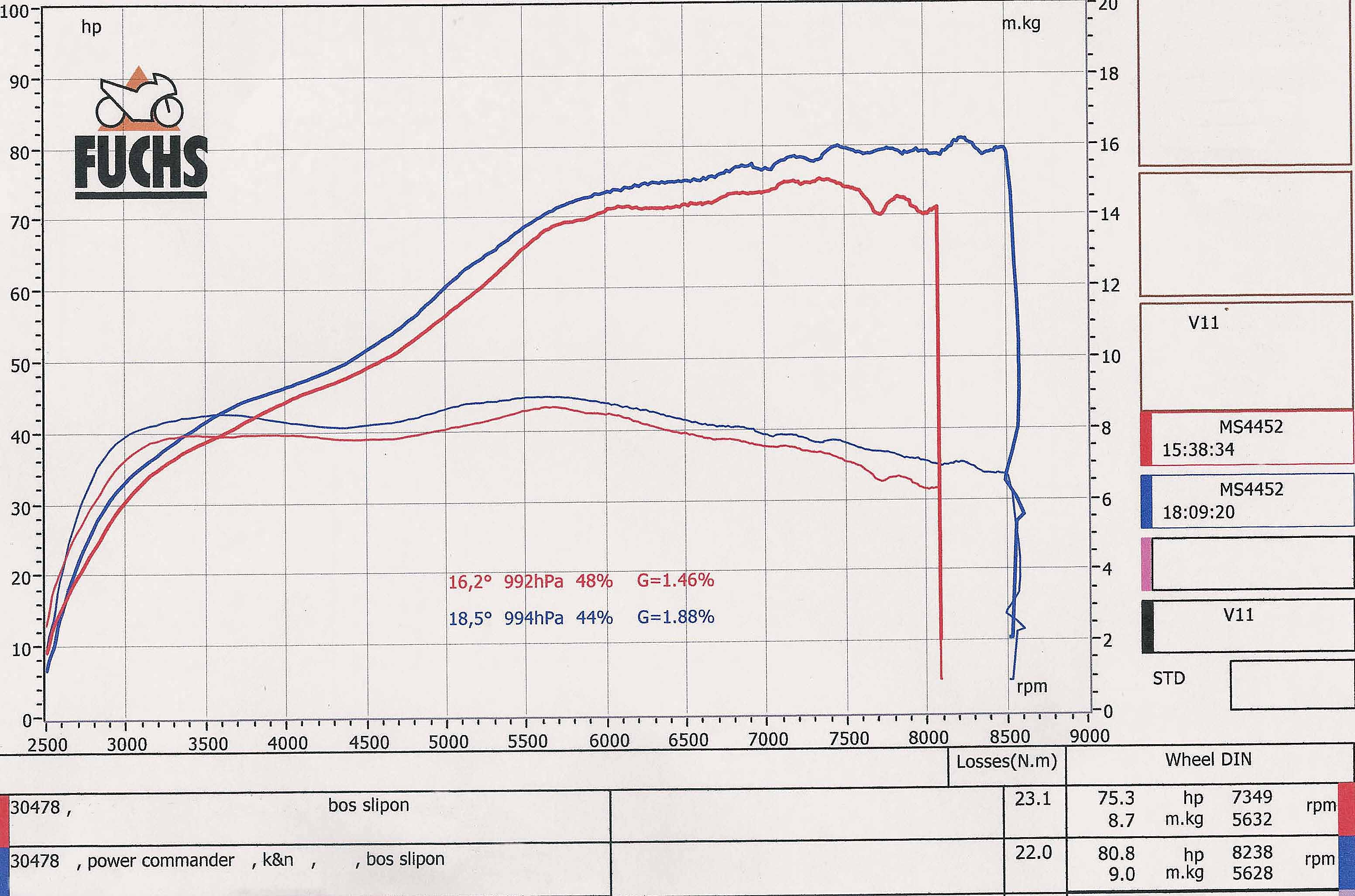 V11 dynamometri tuloste